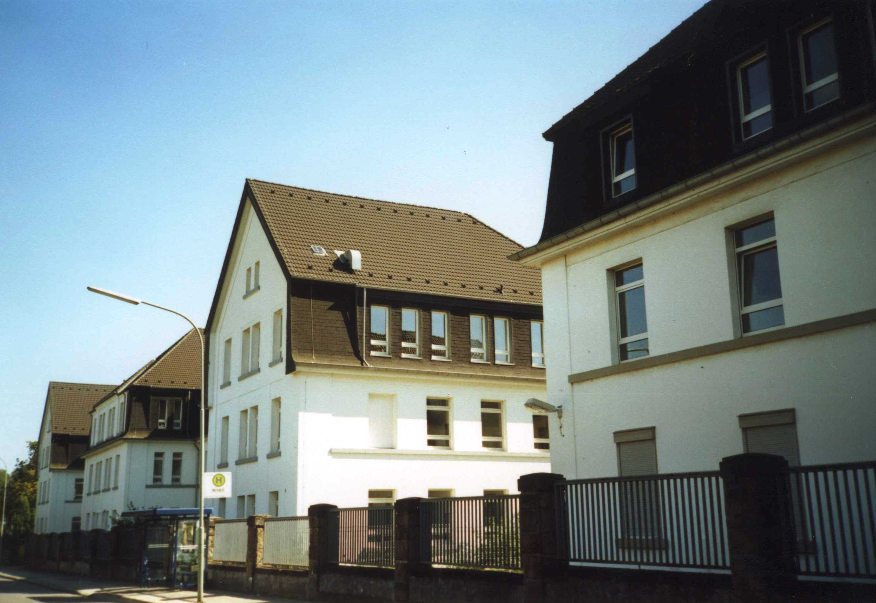 Ehemalige Kaserne "Preyerstraße" in Eschweiler - heute u. a. Gewerbezentrum, Gymnasiumnebengebäude und Polizei